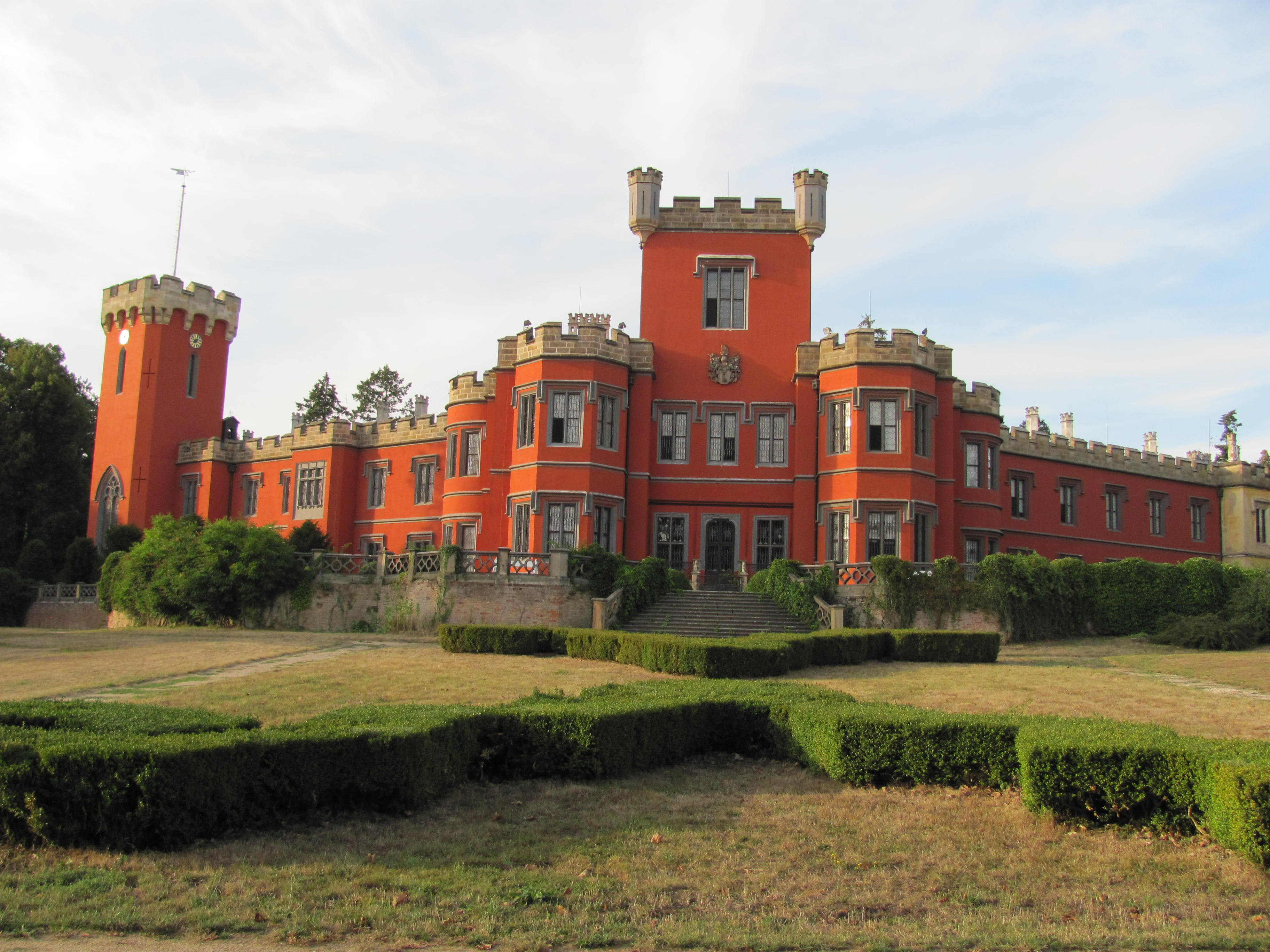 zámek Hrádek u Nechanic (okres Hradec Králové)